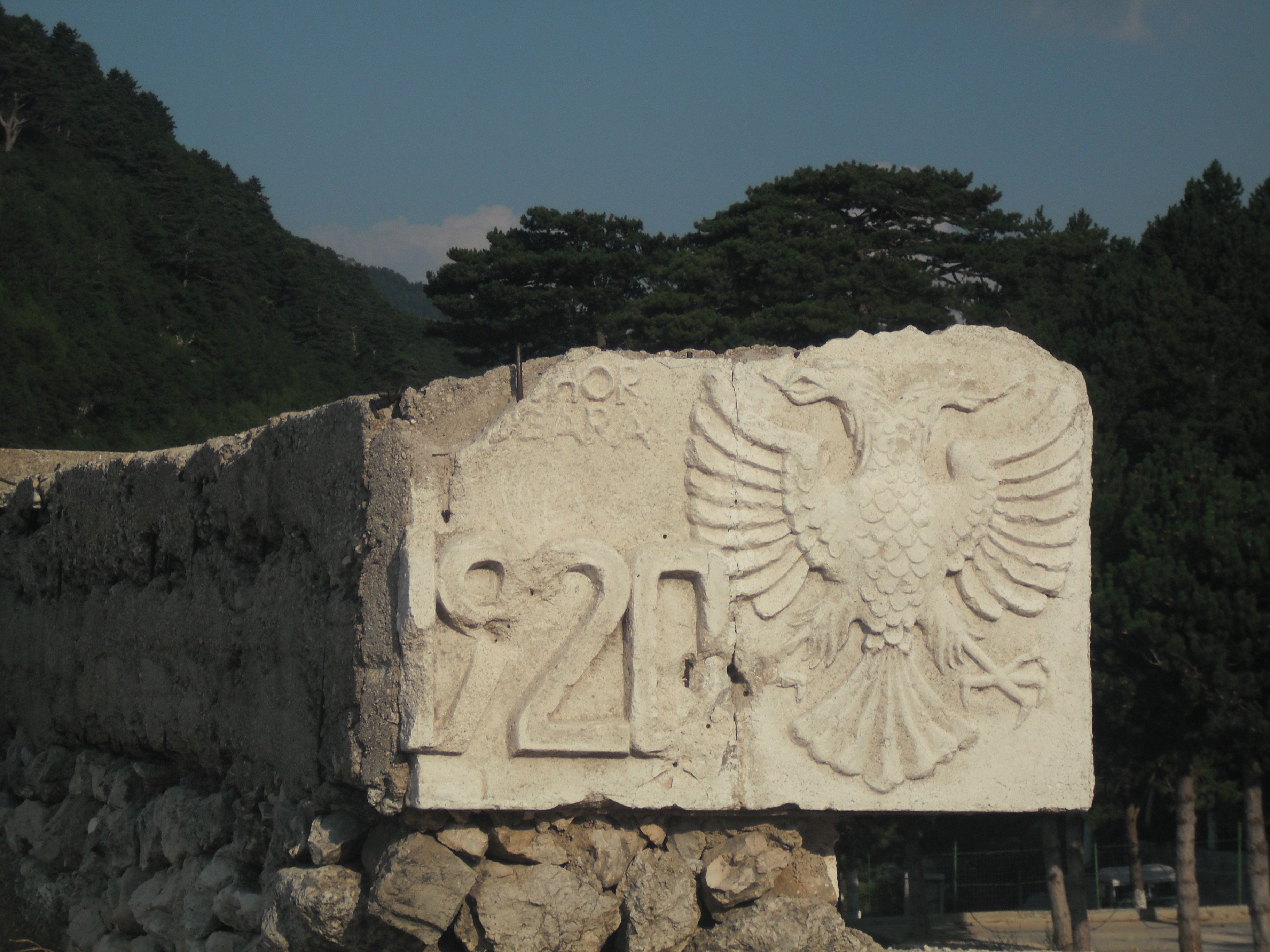 Llogara, Vlore